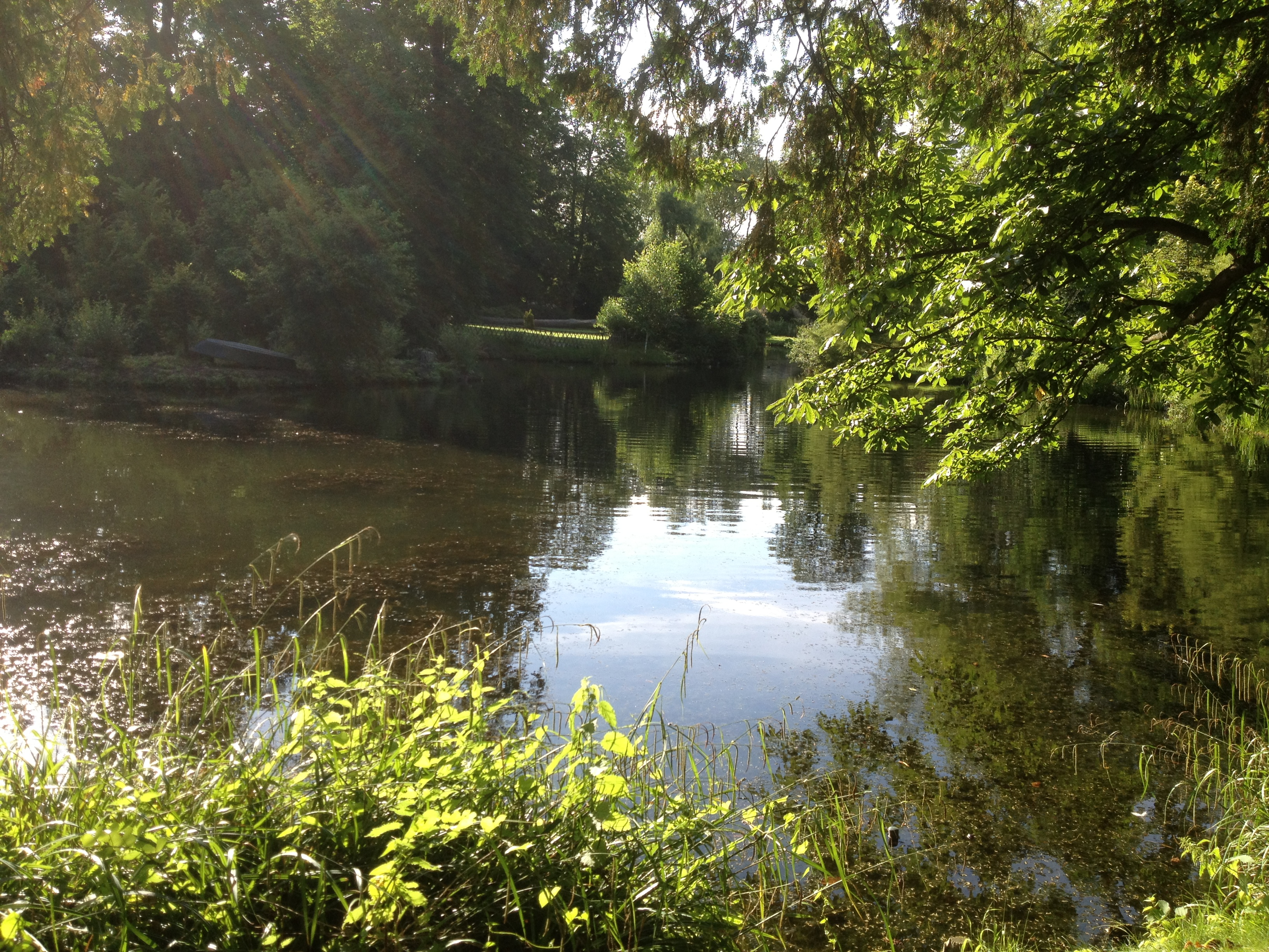 Etang créé originellement en 1787 pour la comtesse Balbi.